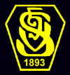 Wappen des ehem. Vereins SpVgg Hof 1893